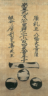 Знамя рода Мори